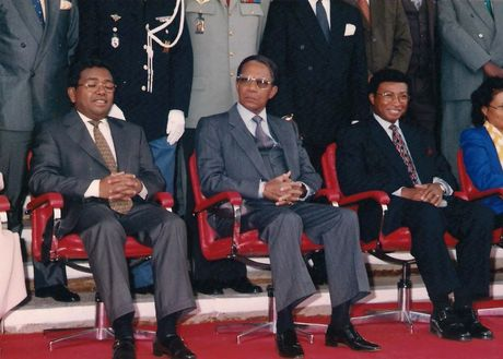 Gouvernement Ratsiraka